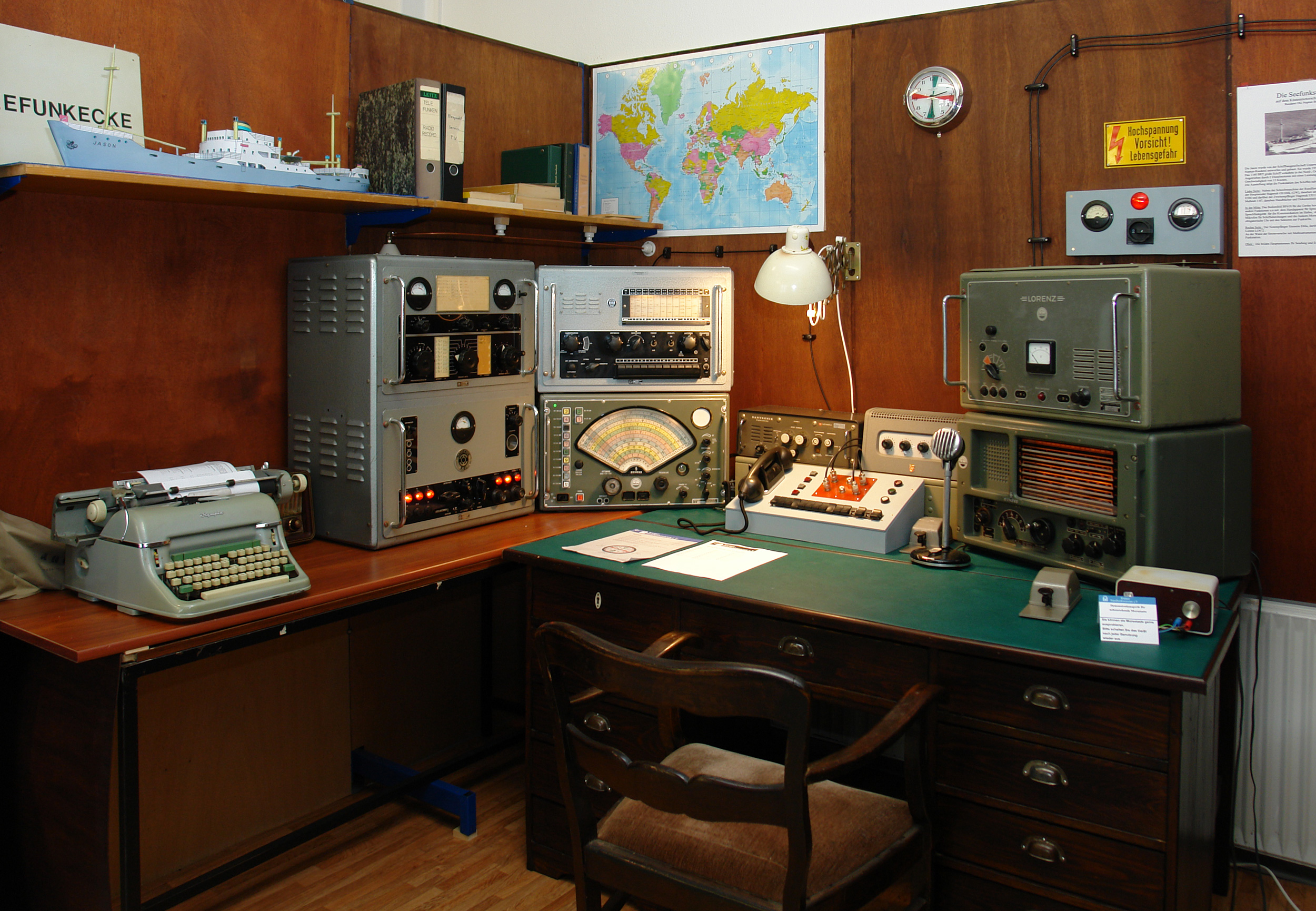 Bremer Rundfunkmuseum: Seefunkstation mit Originalgeräten vom Küstenmotorschiff „Jason“